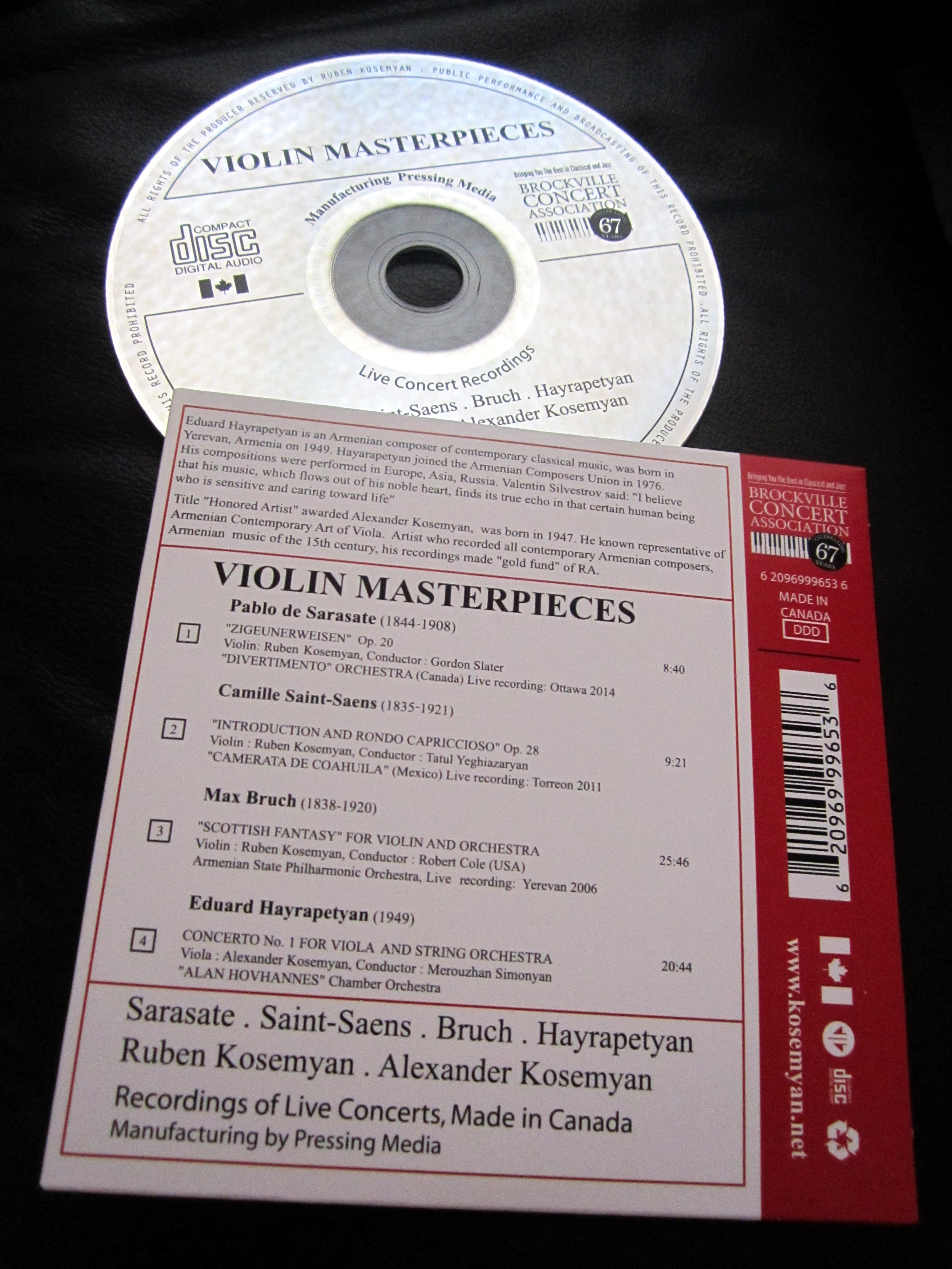 Ռուբեն Կոսեմյանի 2014 թ․ թողարկված ձայնասկավառակը և կազմը